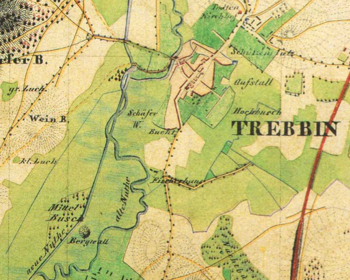 Stadt Trebbin, Brandenburg, Deutschland, Urmesstischblatt Blatt Trebbin 3745, von 1840